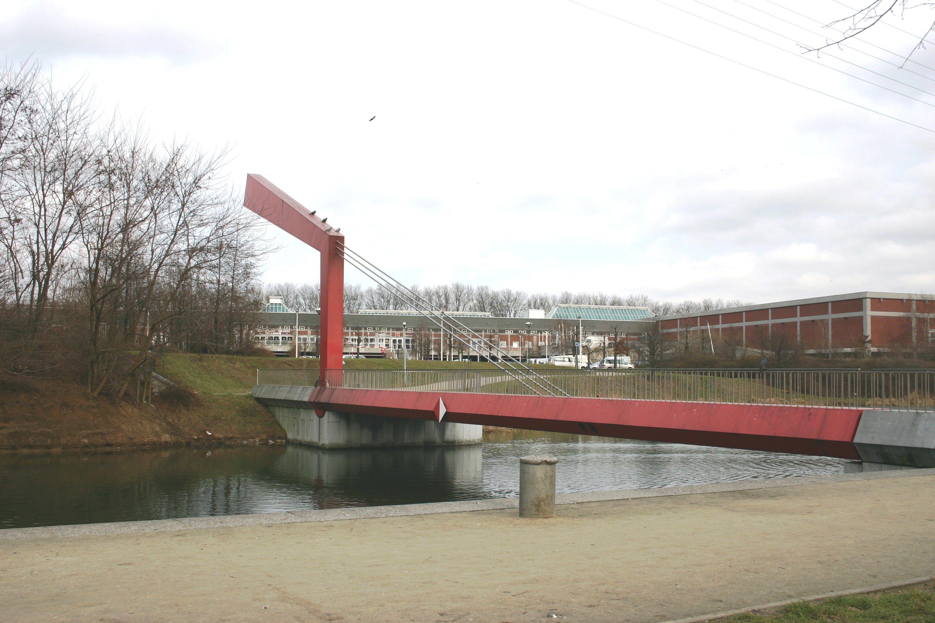 Passerelle des Aguesses.